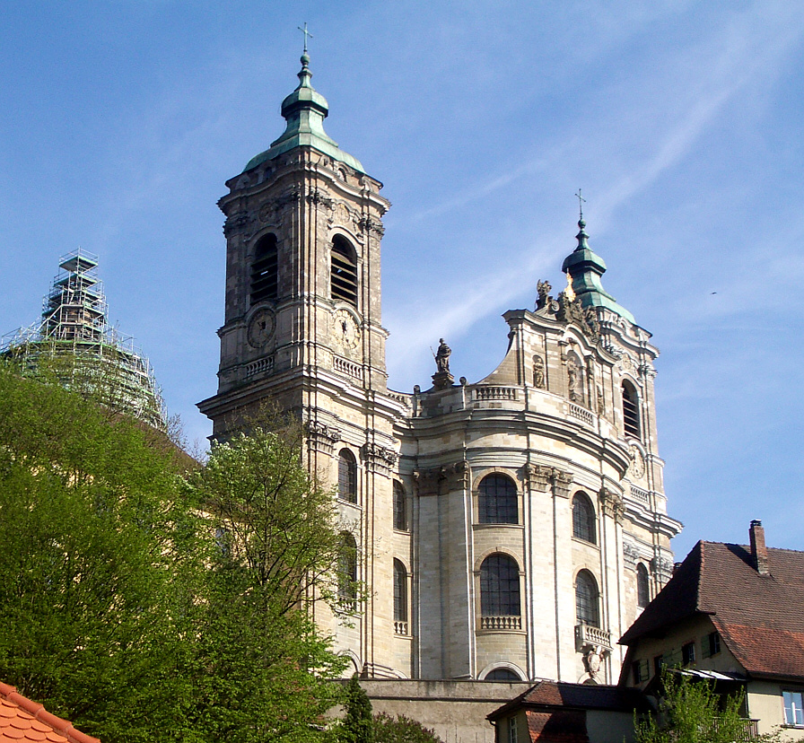 Weingarten, Germany: Basilika St. Martin, view from Northwest